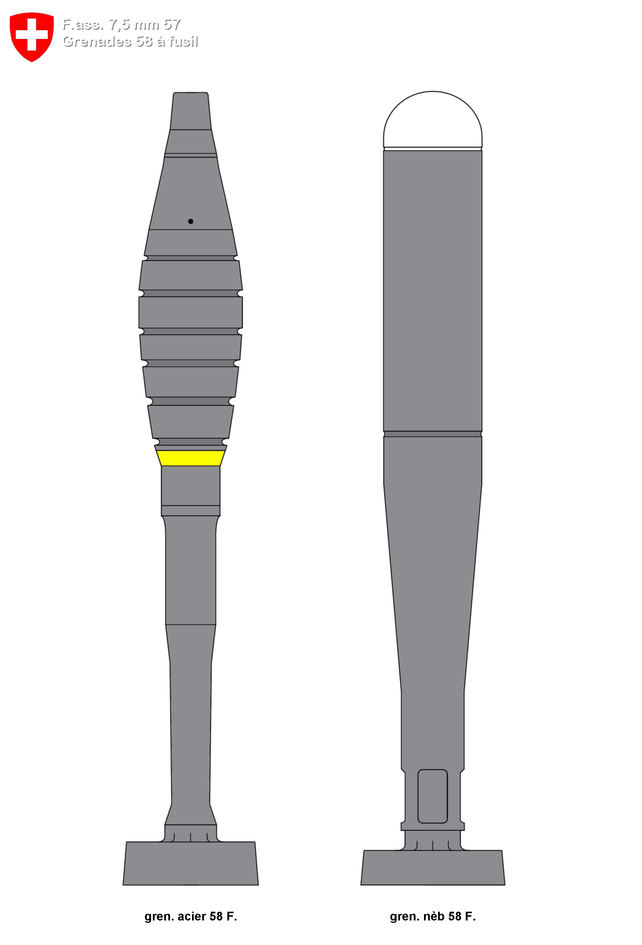 Grenade d'acier 58 & grenade nébulogène 58 (fumigène)